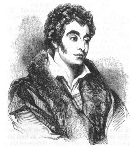 Robert Southey.